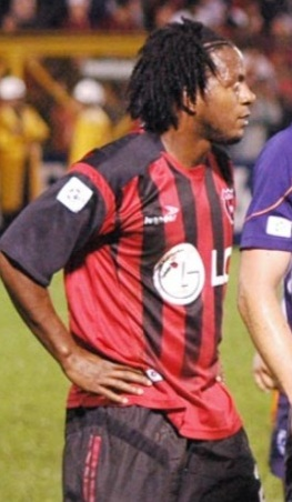 18-10-2006. Víctor Cordero jugando el clásico frente a Alajuelense en el Estadio Alejandro Morera Soto.